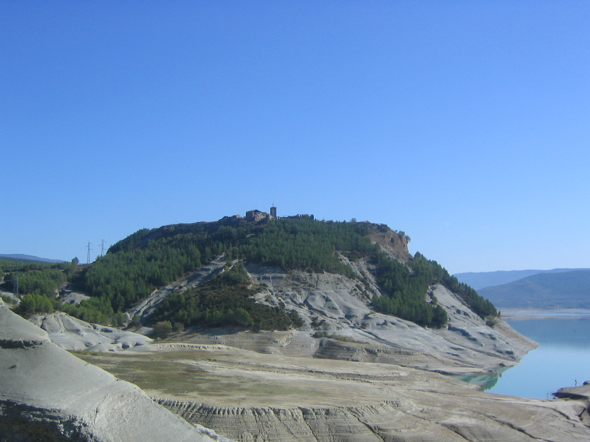 Vista general de Tiermas, Zaragoza España.